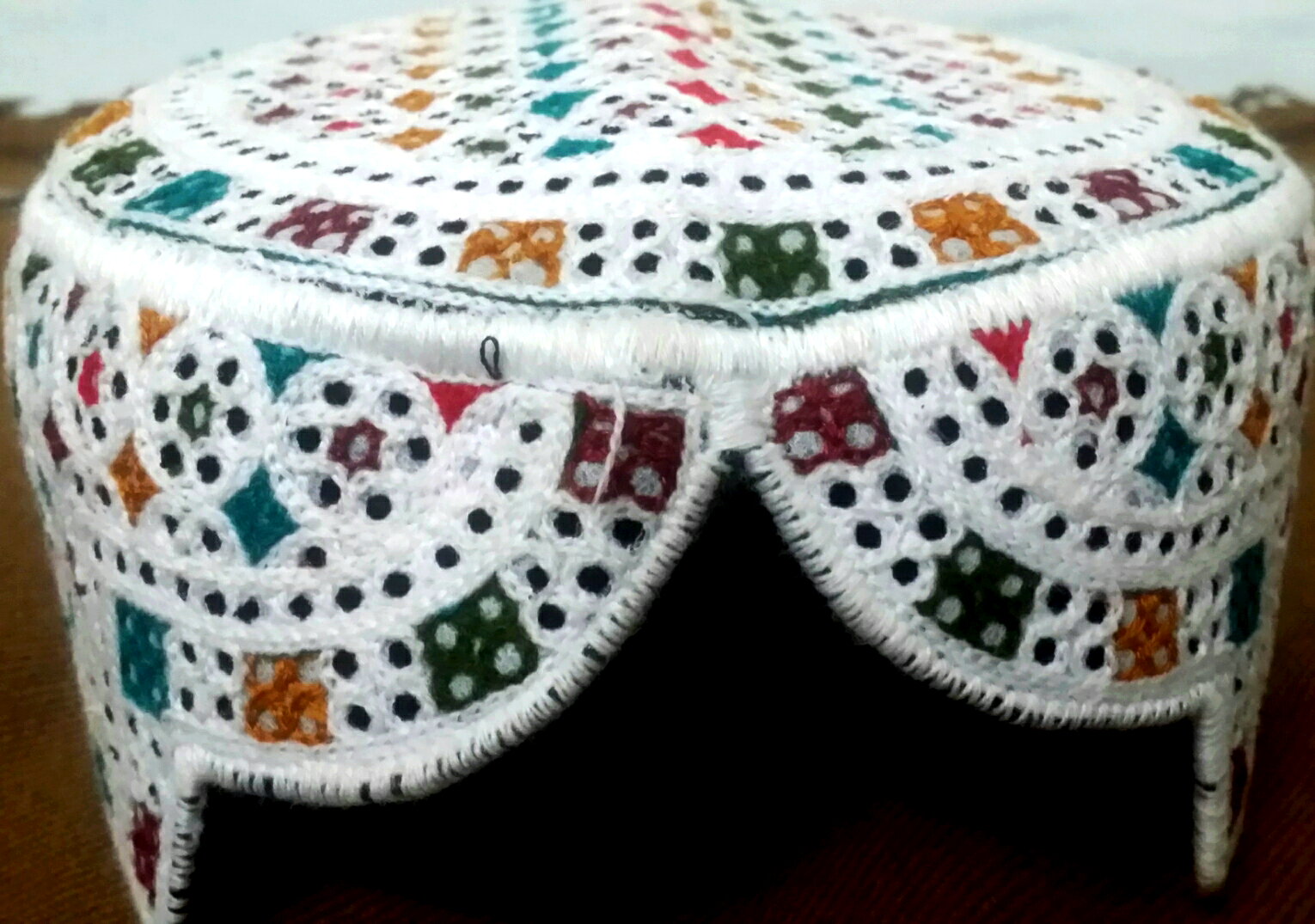 سنڌي: سنڌي ٽوپي